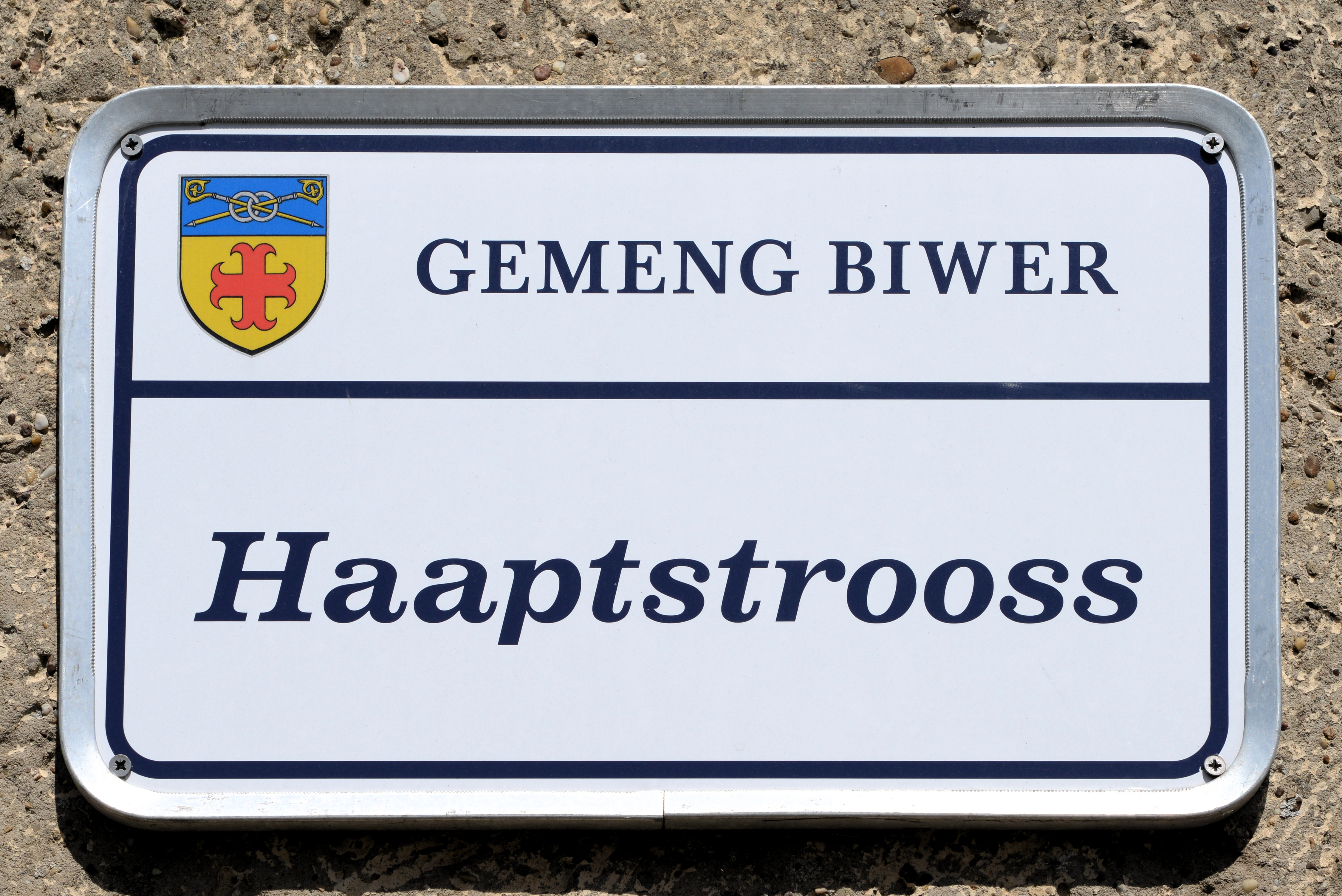 Stroosseschëld zu Biwer.